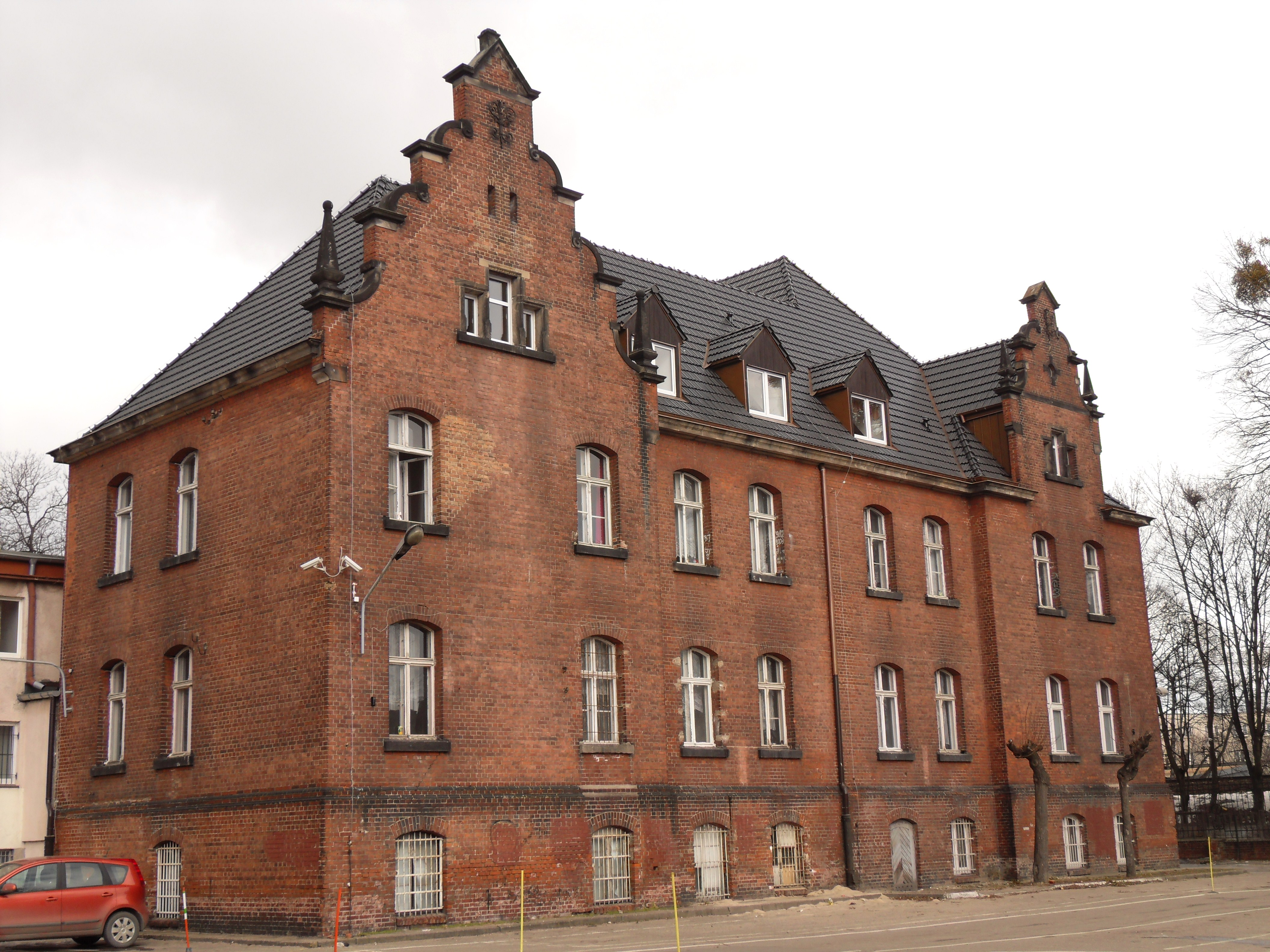 Gdańsk Wrzeszcz, szkoła Conradinum - tył zabytkowego internatu.